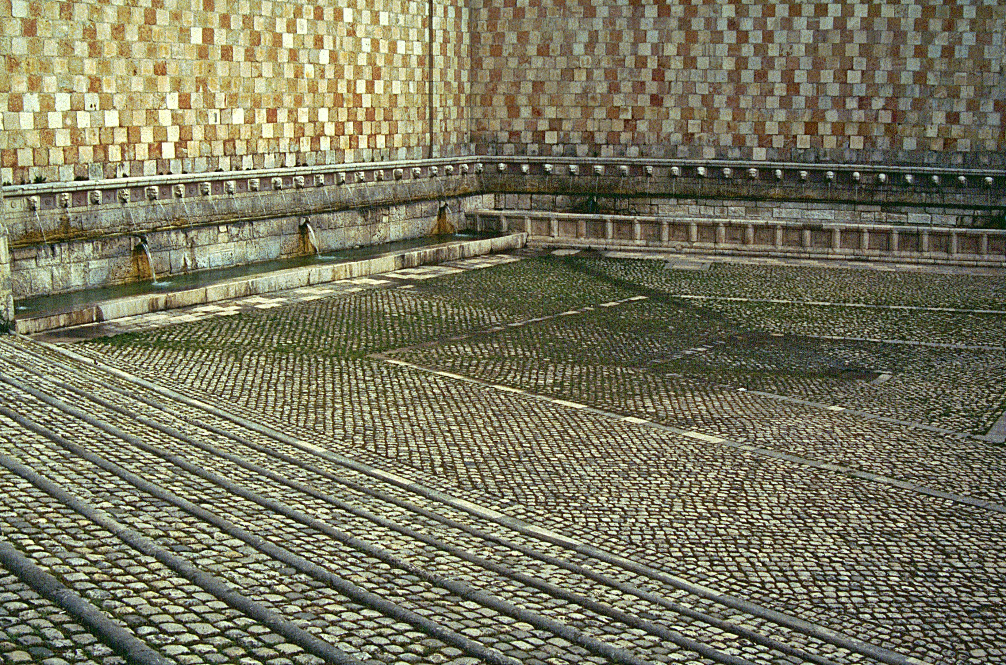 L'Aquila: Fontana delle 99 Cannelle